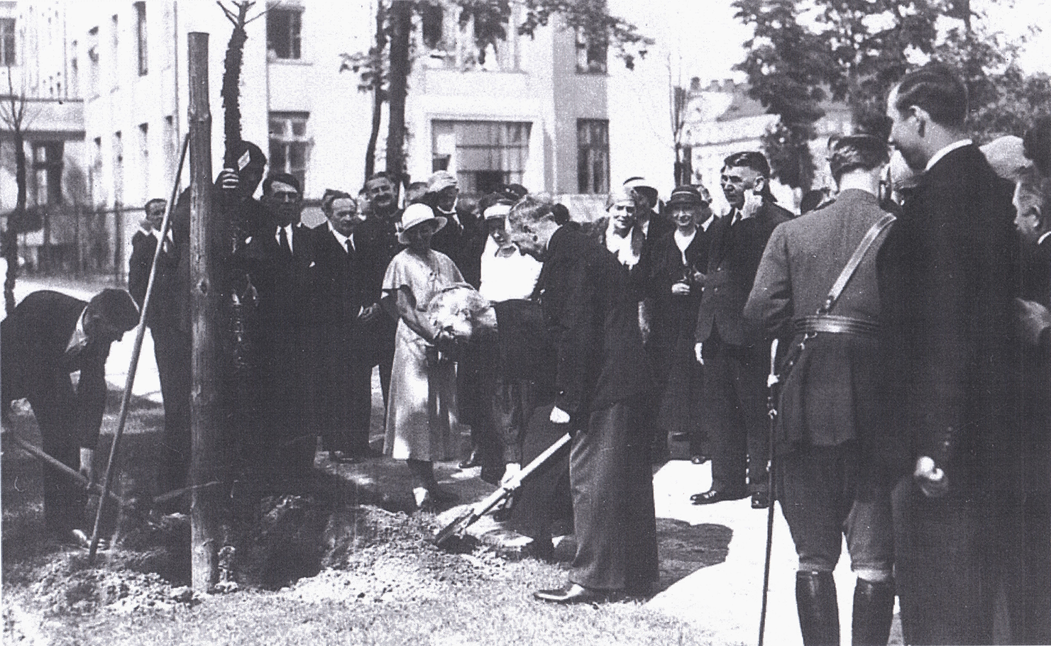 Uroczystość otwarcia klinicznej części Instytutu Radowego w Warszawie w maju 1932 roku. Widoczna pośrodku Maria Skłodowska-Curie sadzi drzewo